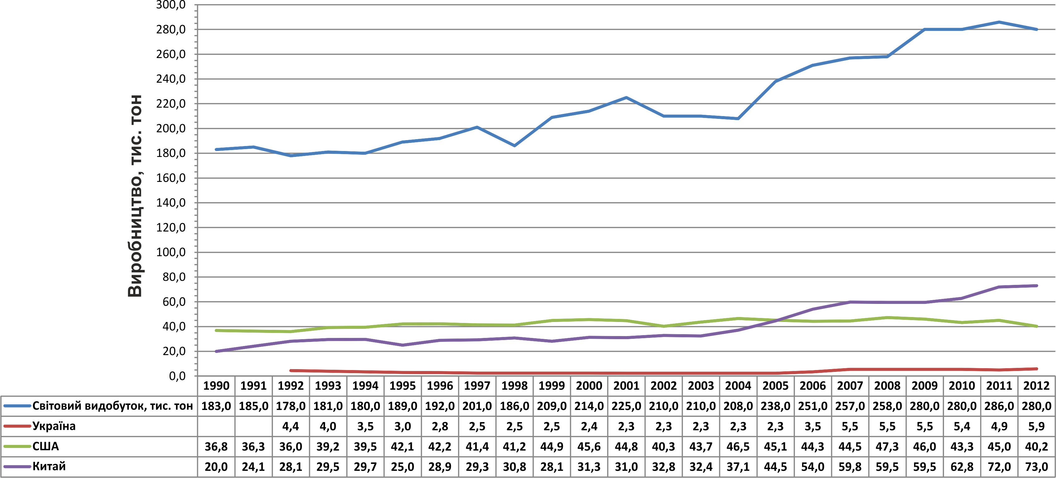 Світове виробництво хлориду натрію (1990-2012). екселівська діаграма